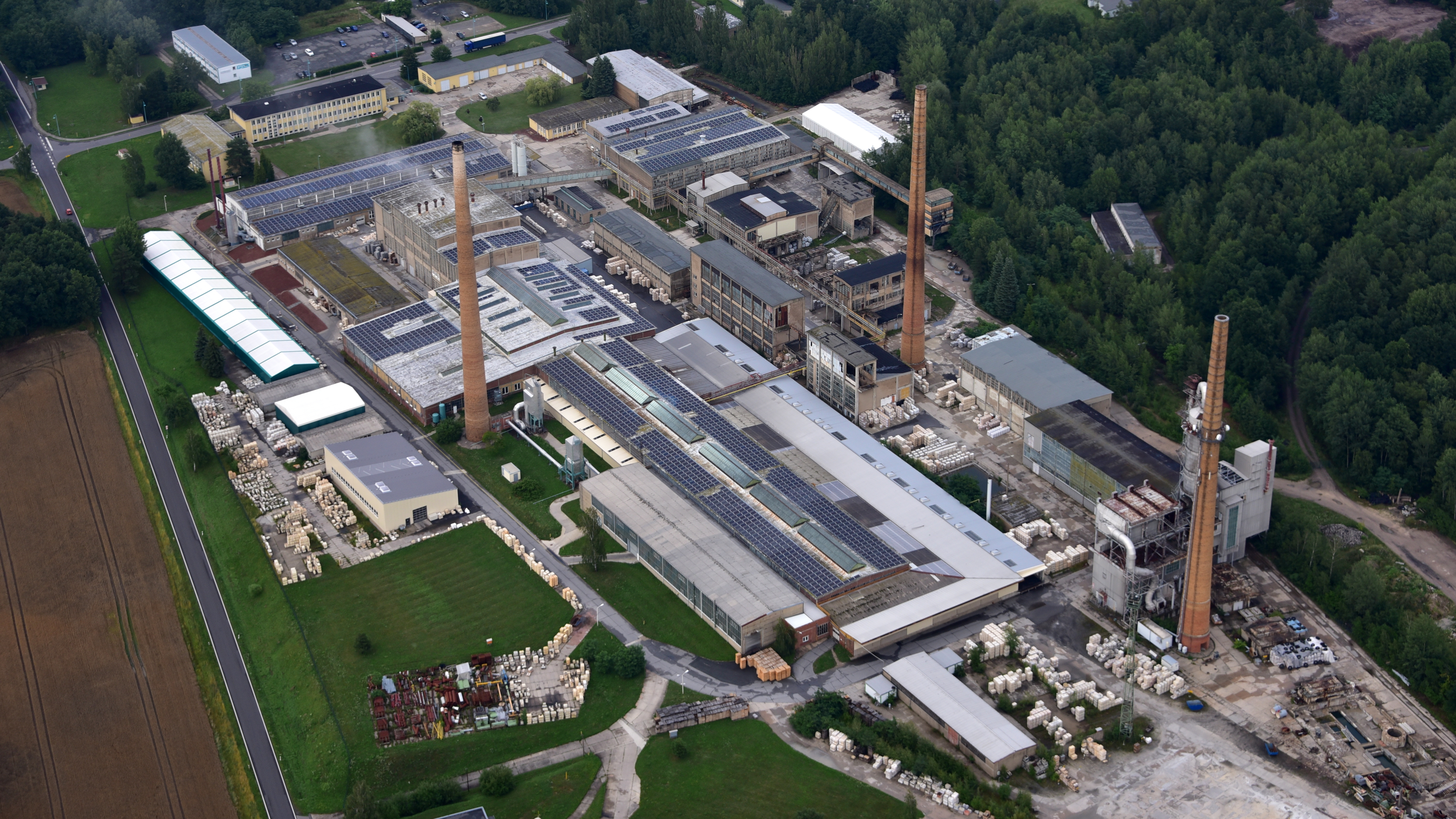 Feuerfestwerke Wetro 003, Puschwitz, Luftaufnahme (2017) Hornjoserbsce: Zawod za wohnjokrute materialije we Wětrowje (2017)